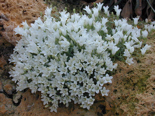 Cette petite Campanule (Campanula myrtifolia) originaire du sud de la Turquie se rencontre sur les paroies rocheuses calcaire.